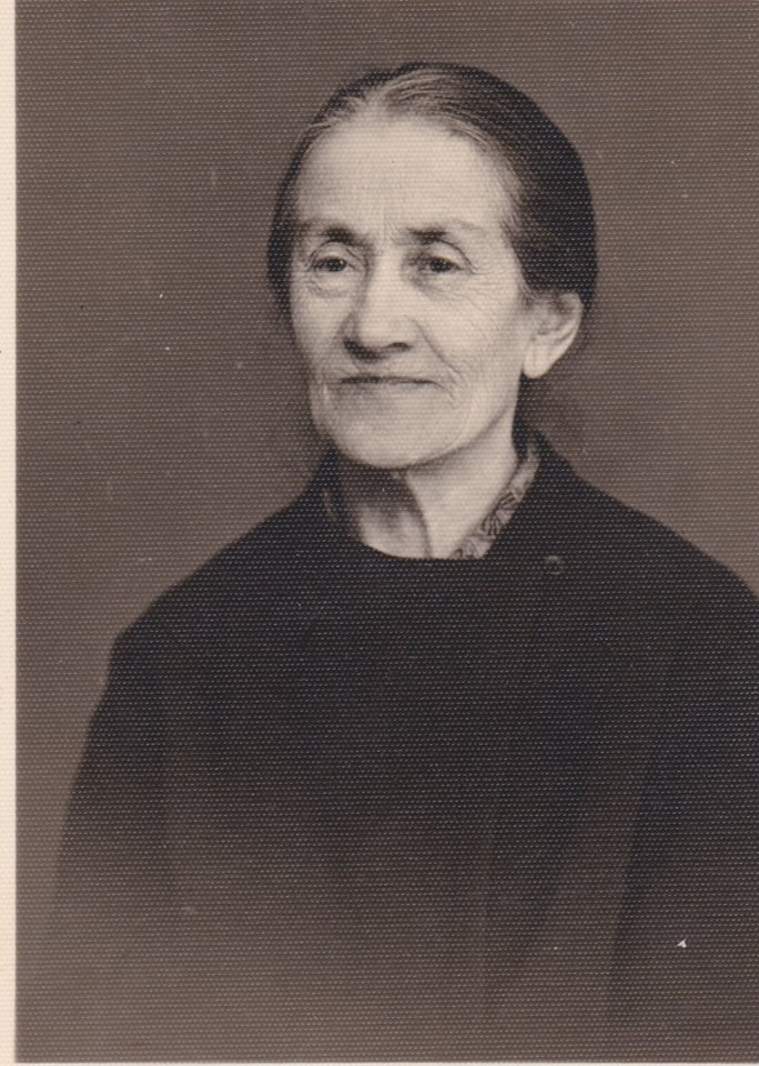 Mina Hübler 1866 bis 1942, umgekommen in Theresienstadt